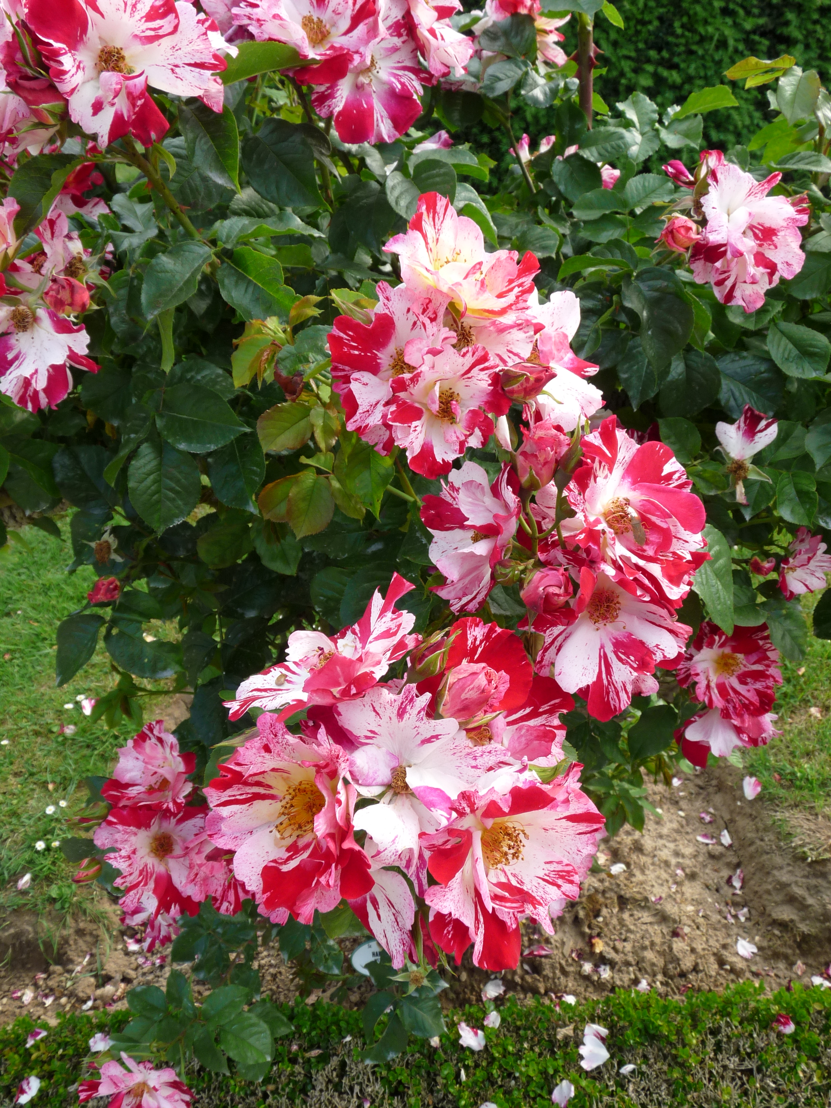 Rosier 'Fourth of July' au jardin de Bagatelle.